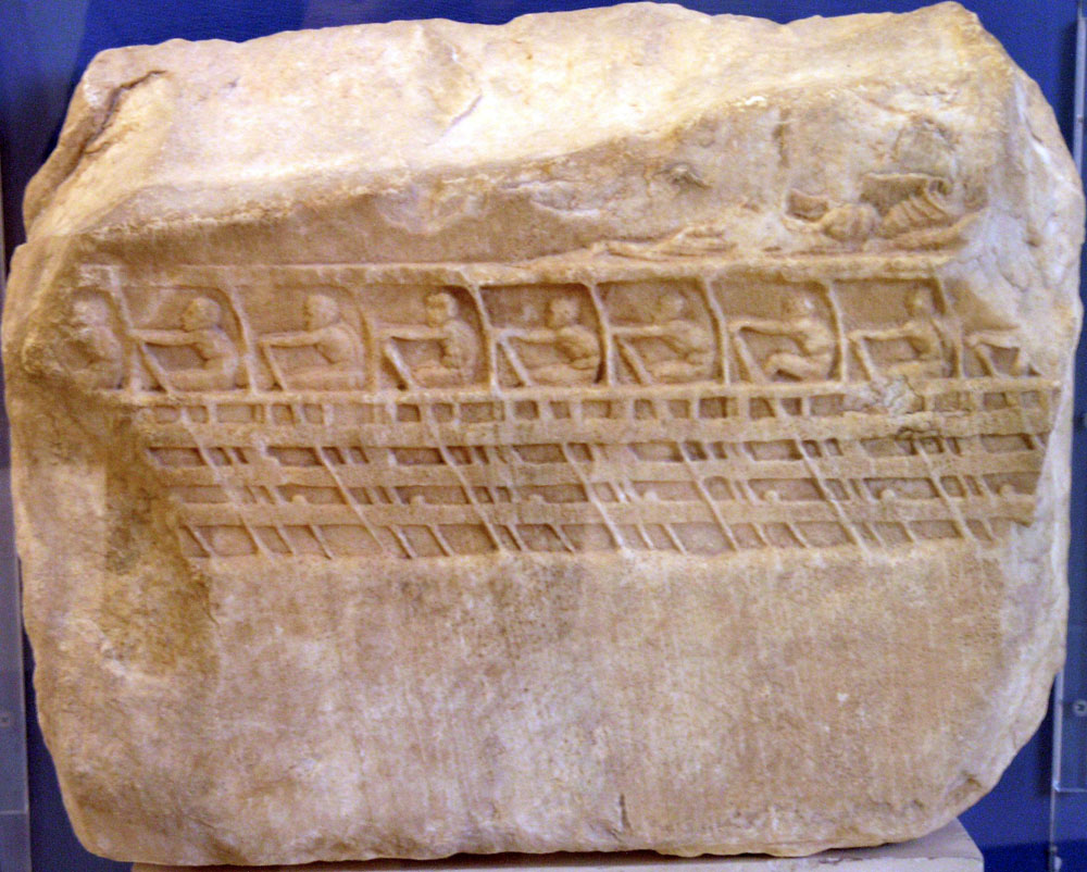 Fragment d'un bas-relief représentant une trière athénienne avec 9 rameurs. Deux autres fragments existent de ce relief au Musée national et dans les apothèques. Selon la reconstruction de L. Beschi, la composition originale représentait une grande trière avec ses 25 rameurs, le navigateur et le commandant. Un jeune homme à droite représente probablement le héros Paralos, inventeur de la navigation.